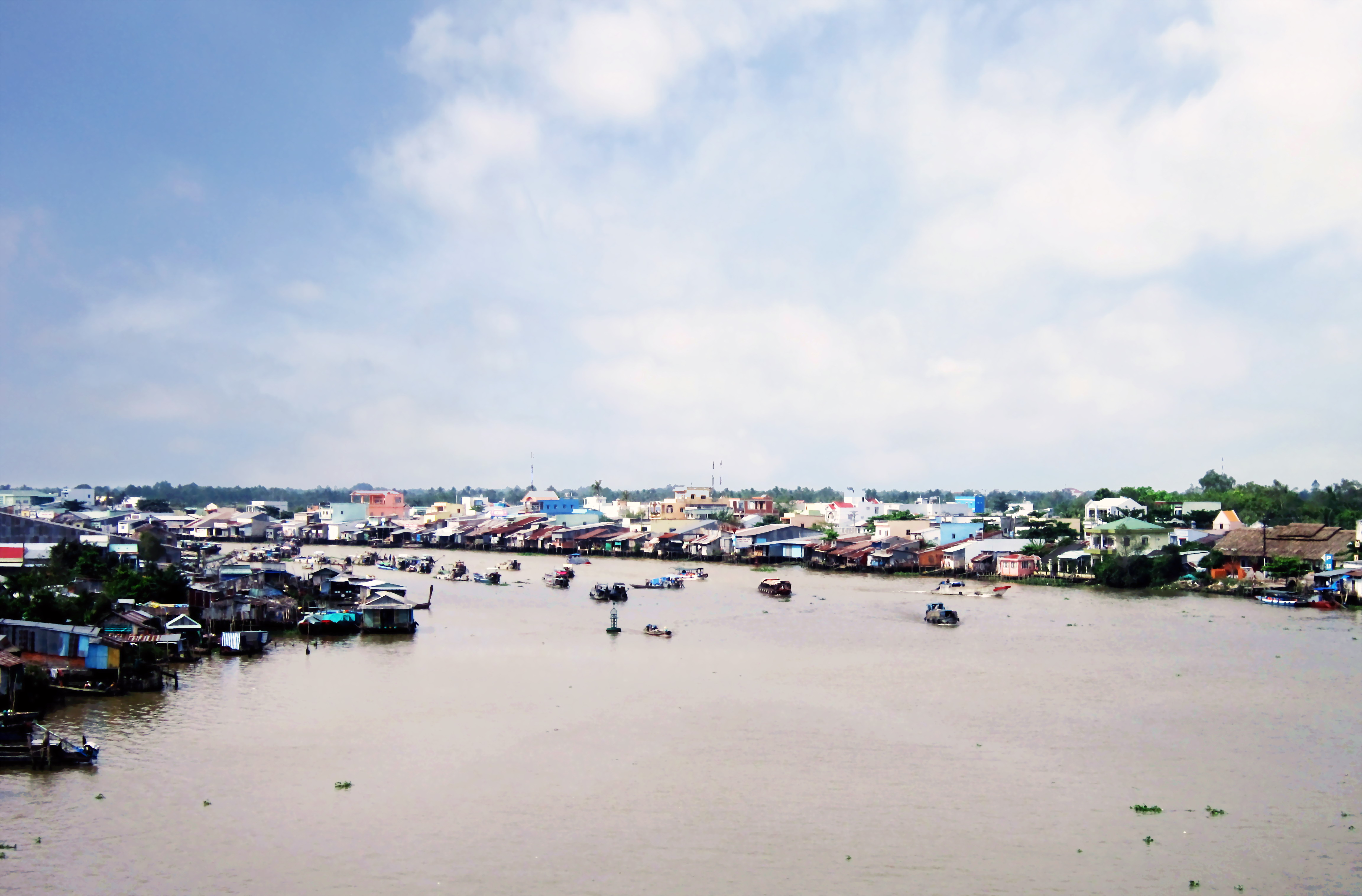 Vepsän kel’: Sông Cần Thơ, đoạn chảy qua chợ nổi Cái Răng (Việt Nam).